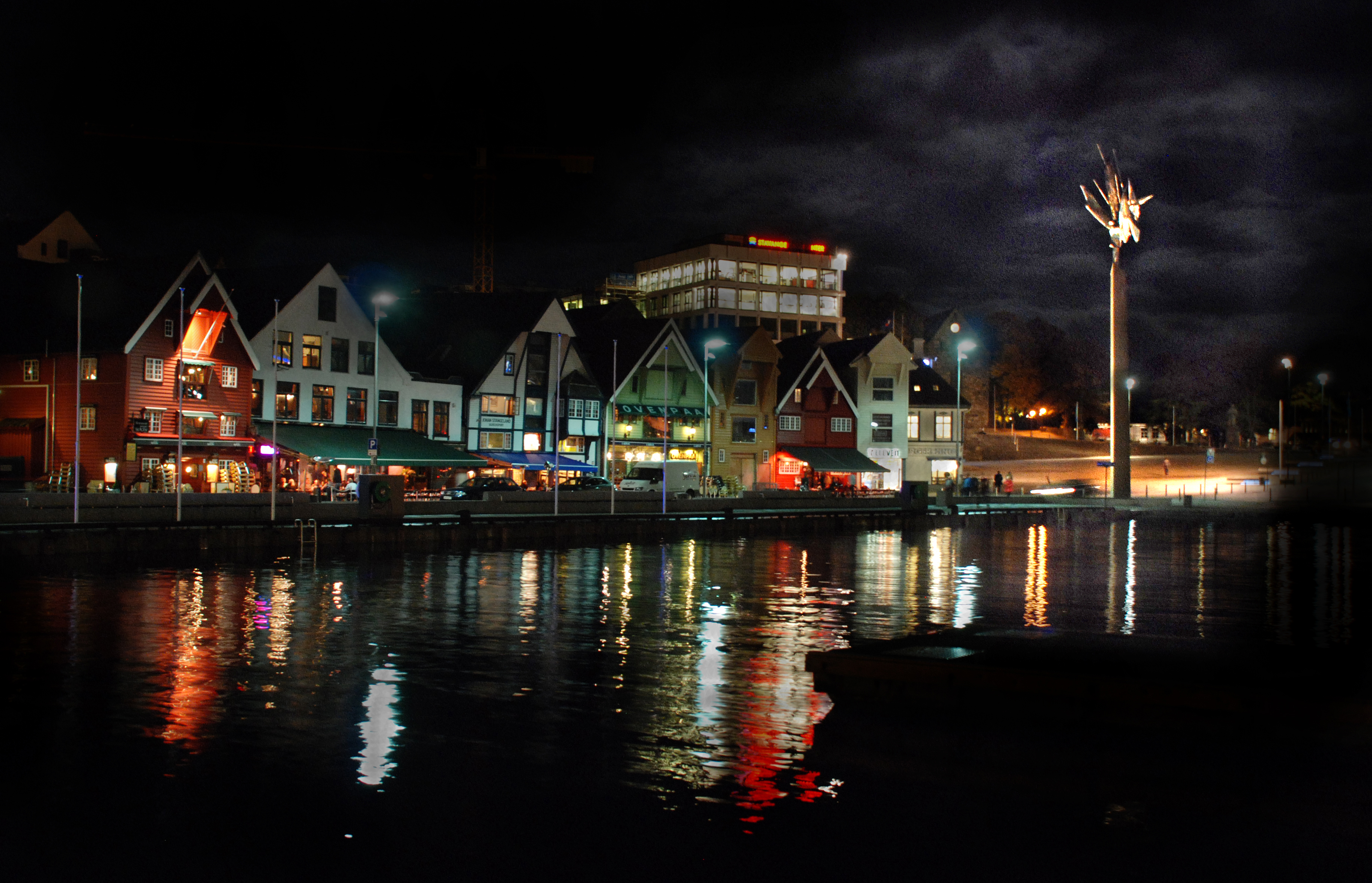 Sjøfartsmonument av Arnold Haukeland på det gamle fisketorget i Stavanger.